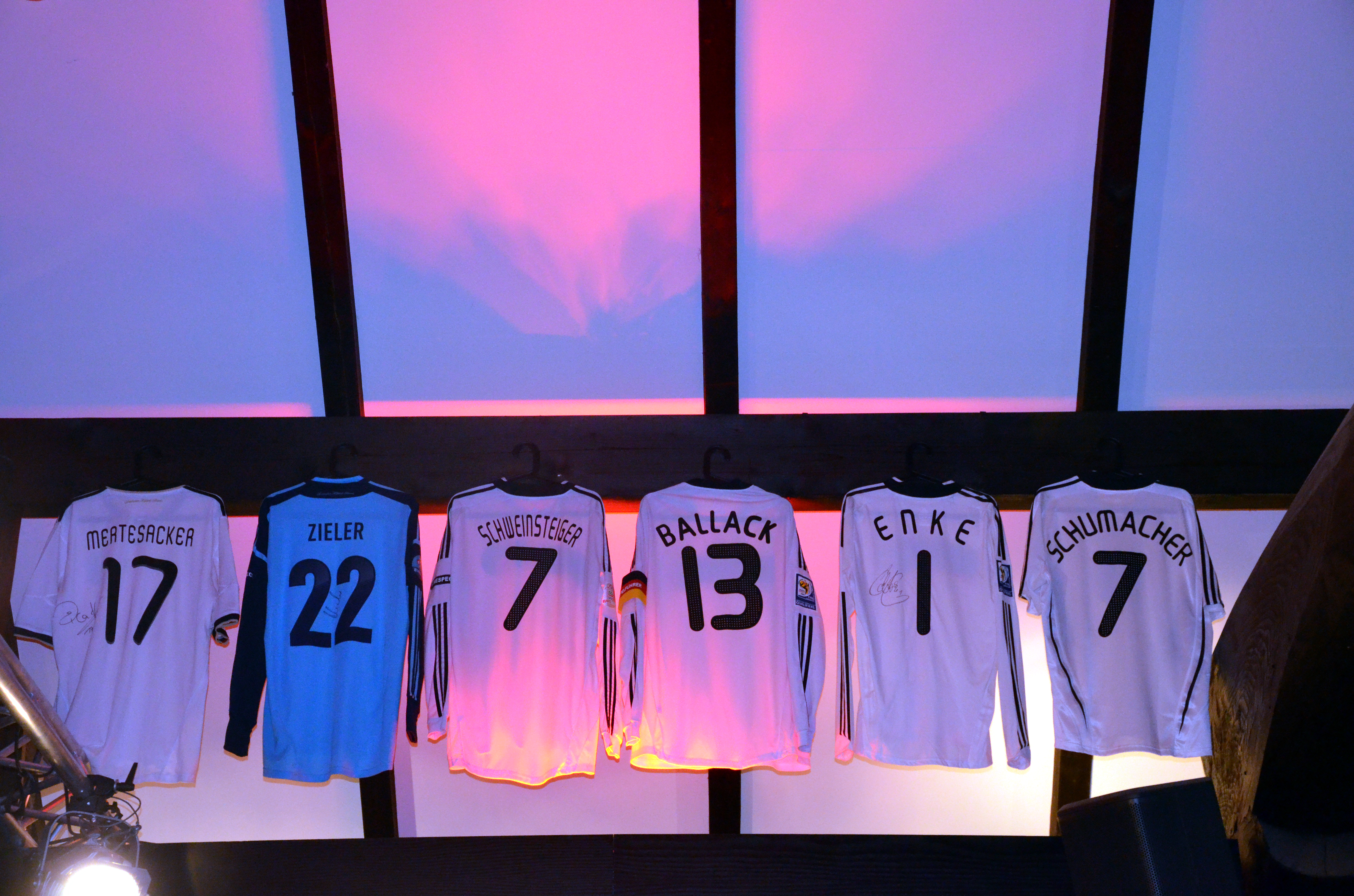 Foto in der Nordkurve gegenüber der HDI-Arena von einem Teil der dort ausgestellten Fußballspieler-Trikots (hier: Mertesacker, Zieler, Schweinsteiger, Ballack, Enke und Schuhmacher), aufgenommen 2013 beim abendlichen Meeting während der Wirtschaftsmesse Hannover, bei dem unter anderem das gemeinschaftlich entstandene Kunstobjekt BUBBLEWRK des kre